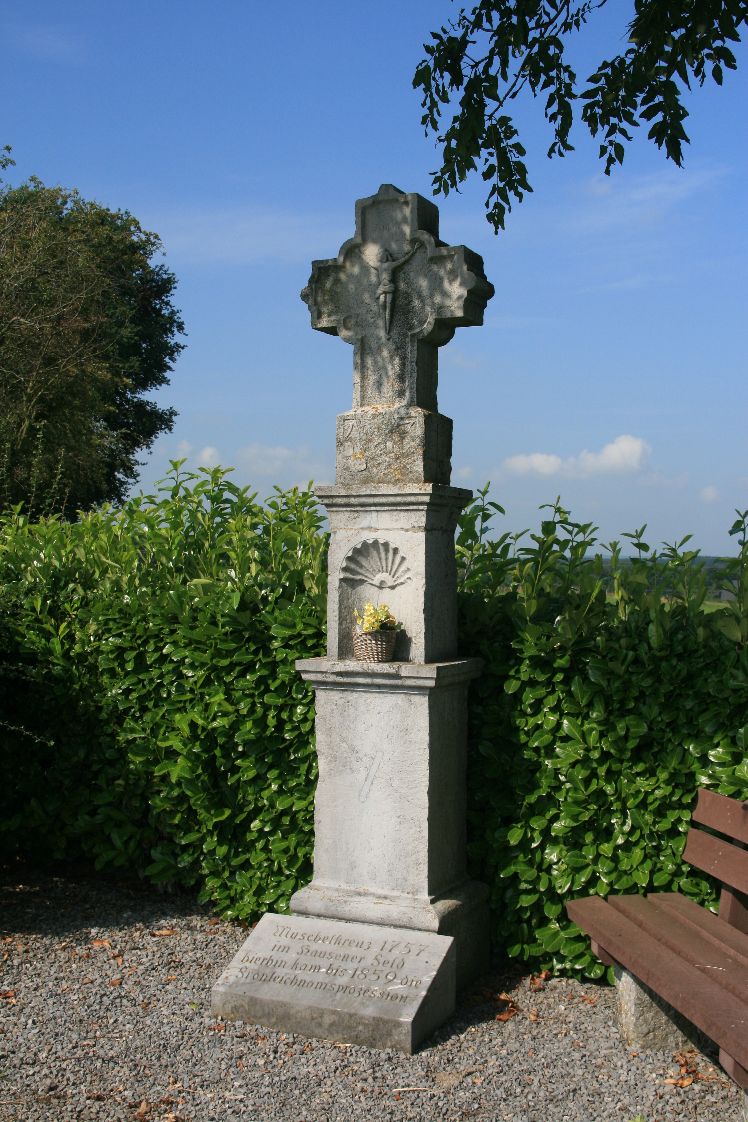 Barockes Andachtskreutz aus dem Jahre 1757. Die Gesamthöhe beträgt 306 cm. Es steht auf der Asteneter Straße, ca. 1 Km von der Rochuskapelle entfernt. Inschrift Tafel: "Muschelkreuz 1757 im Hauseter Feld. Hierhin kam bis 1859 die Fronleichnamsprozession"